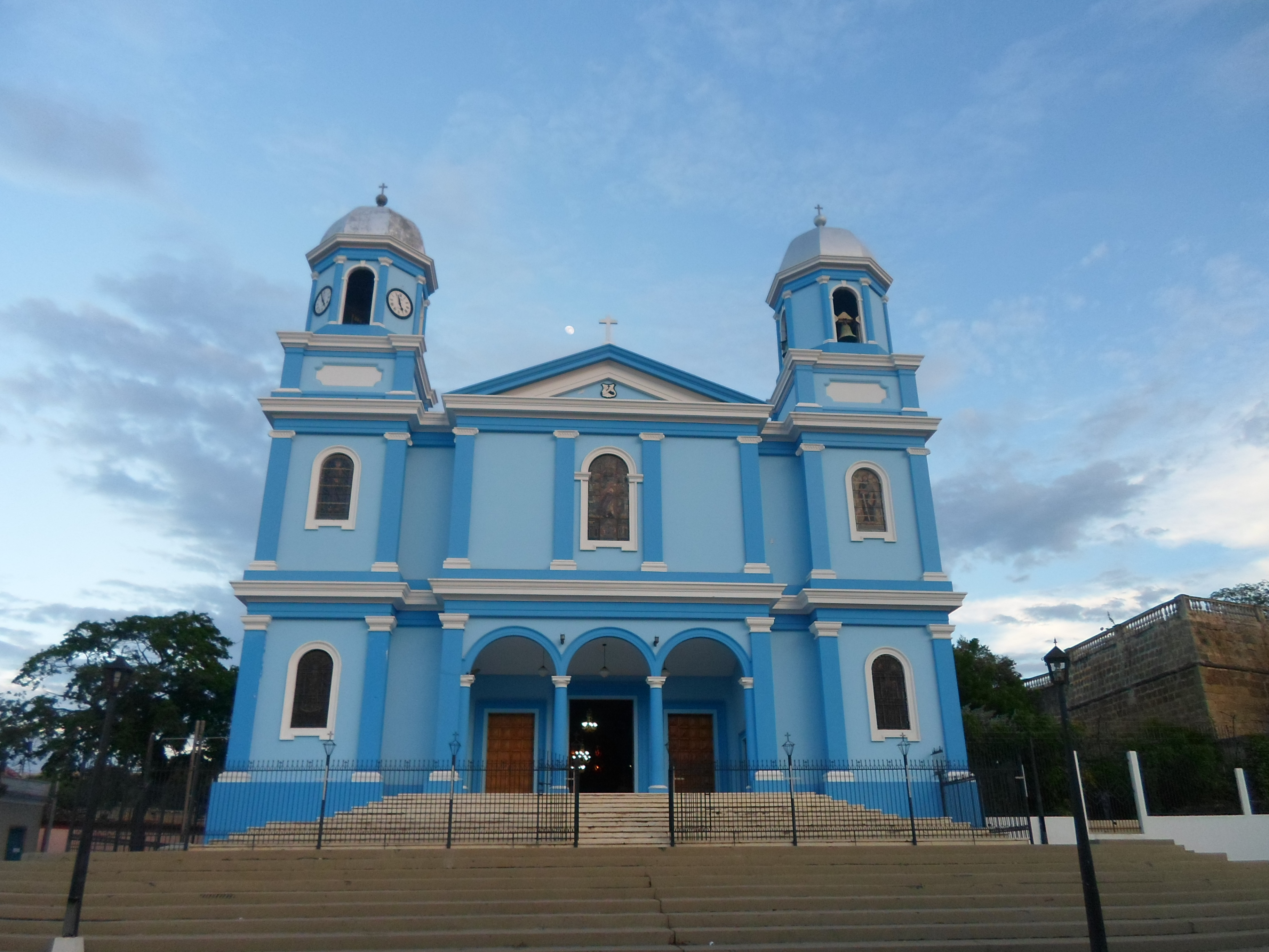 Fachada de la Iglesia de Santa Inés.